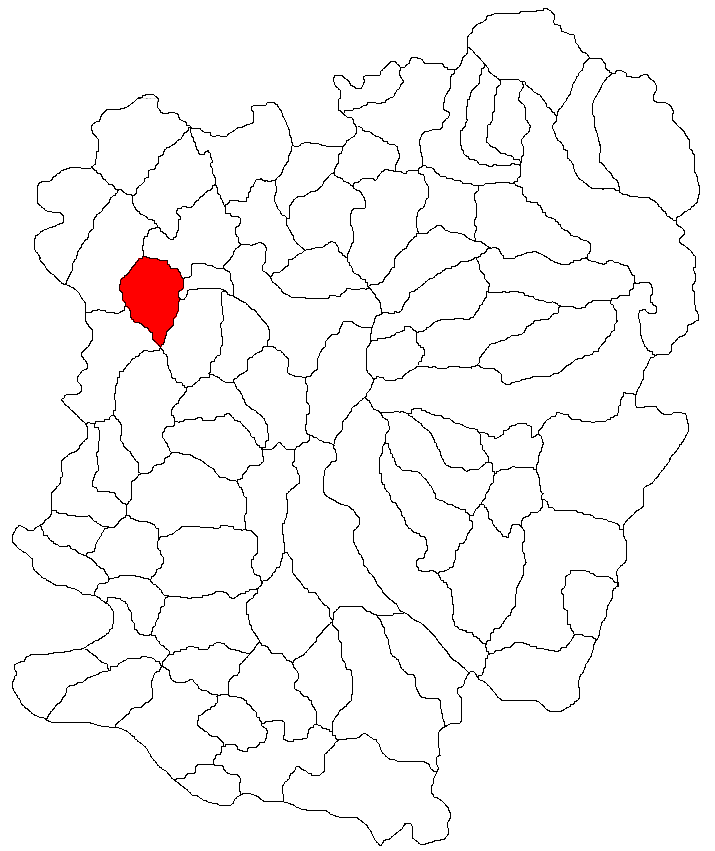 Categorie:Hărţi ale judeţului Caraş-Severin